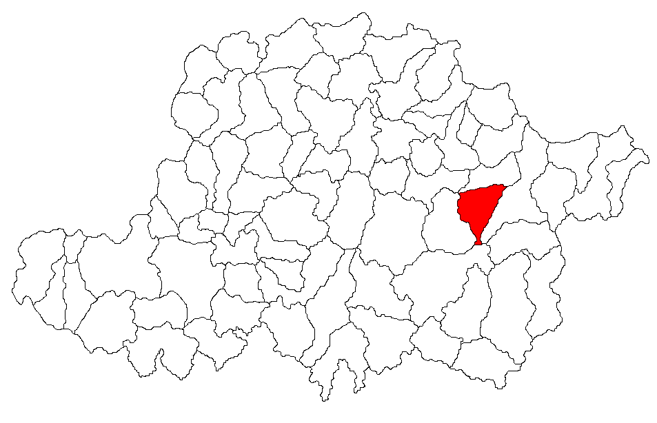 Categorie:Hărţi ale judeţului Arad